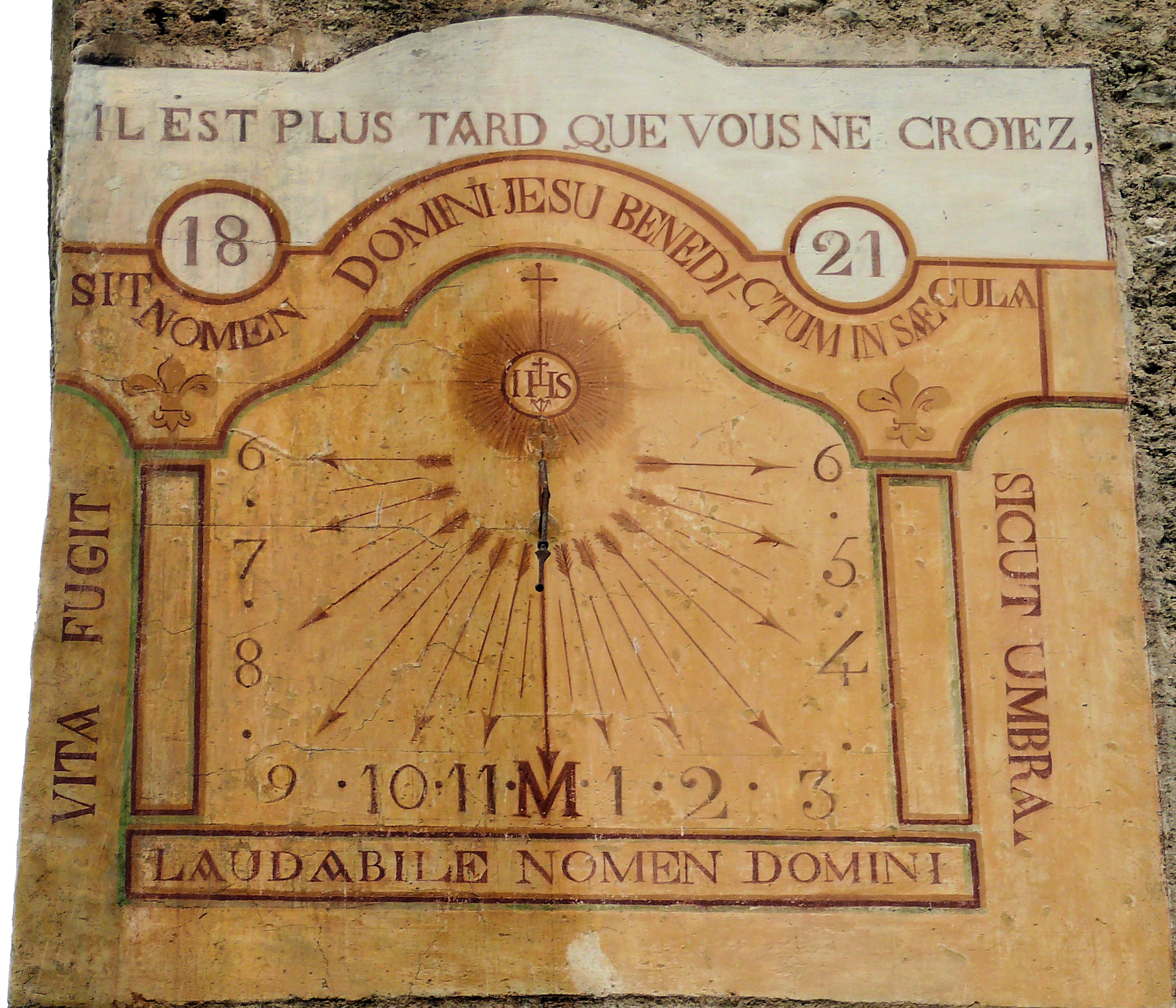 Abriès - Église Saint-Pierre-Saint-Paul-et-Saint-Antoine - Cadran solaire